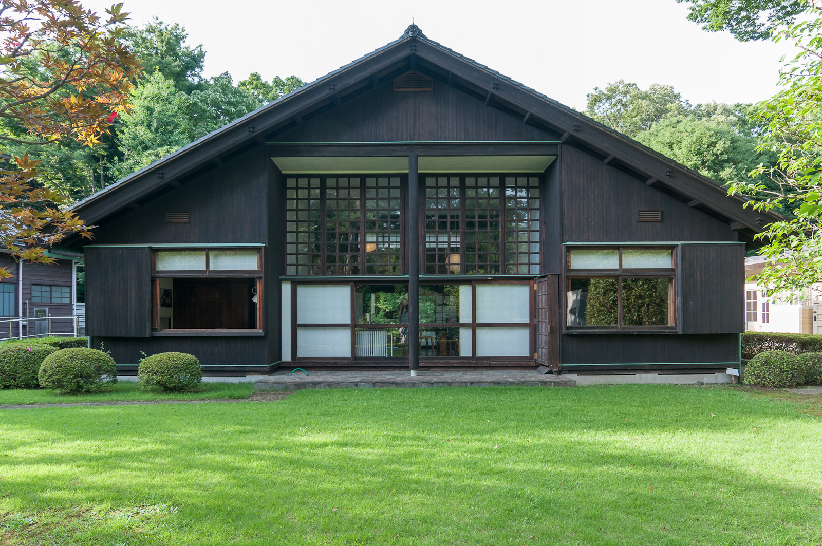 前川國男邸、江戸東京たてもの園。